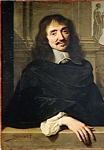 François Mansard. Detail of double portrait of François Mansard and Claude Perrault